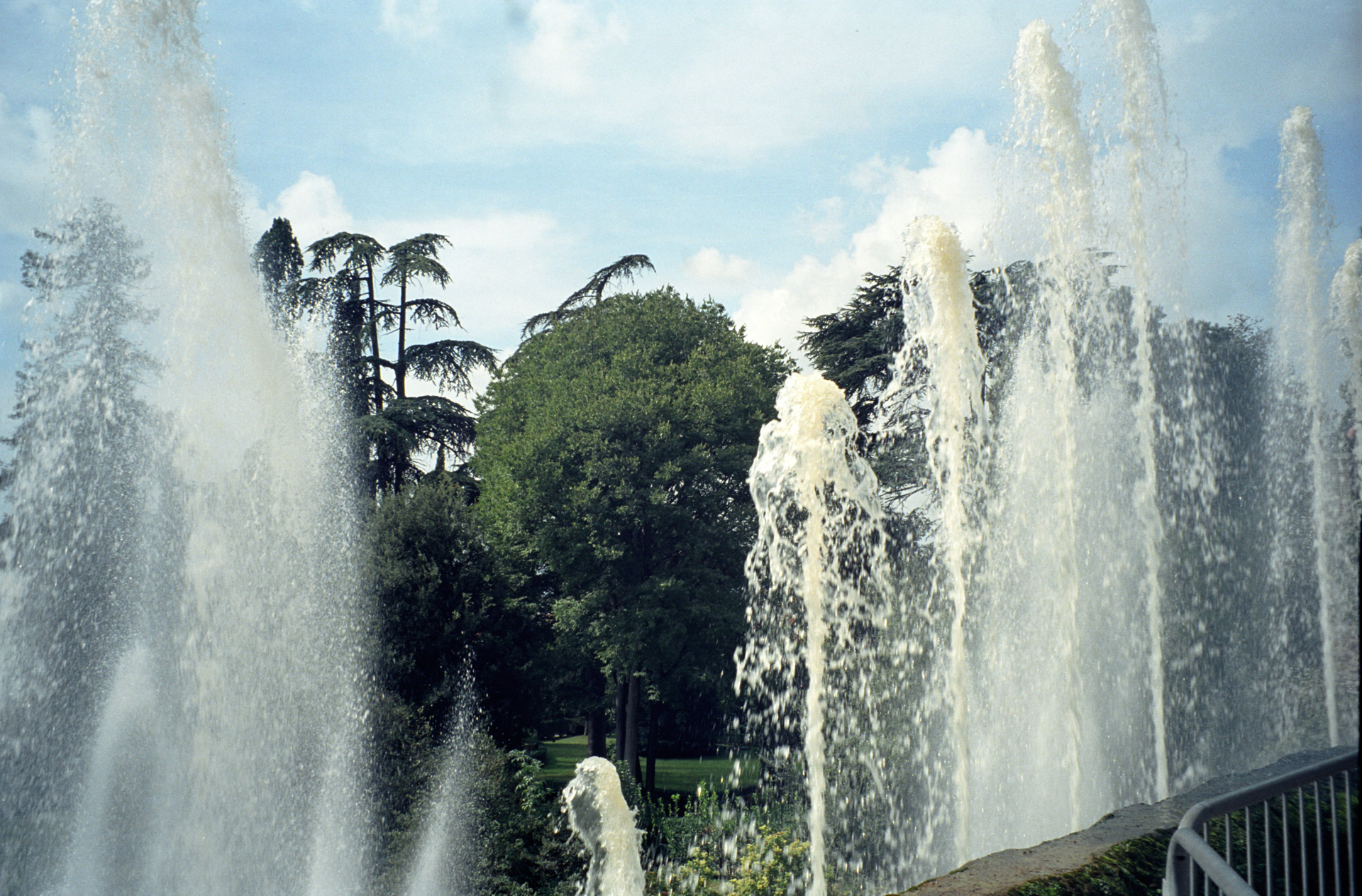 Villa d'Este, Tivoli